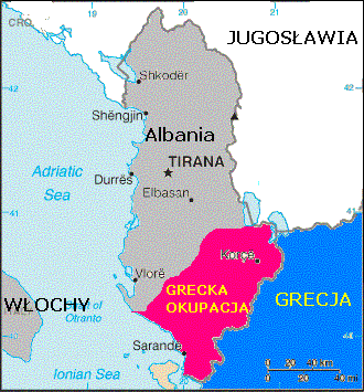 Grecka okupacja południowej Albanii w czasie wojny włosko-greckiej 1940-1941